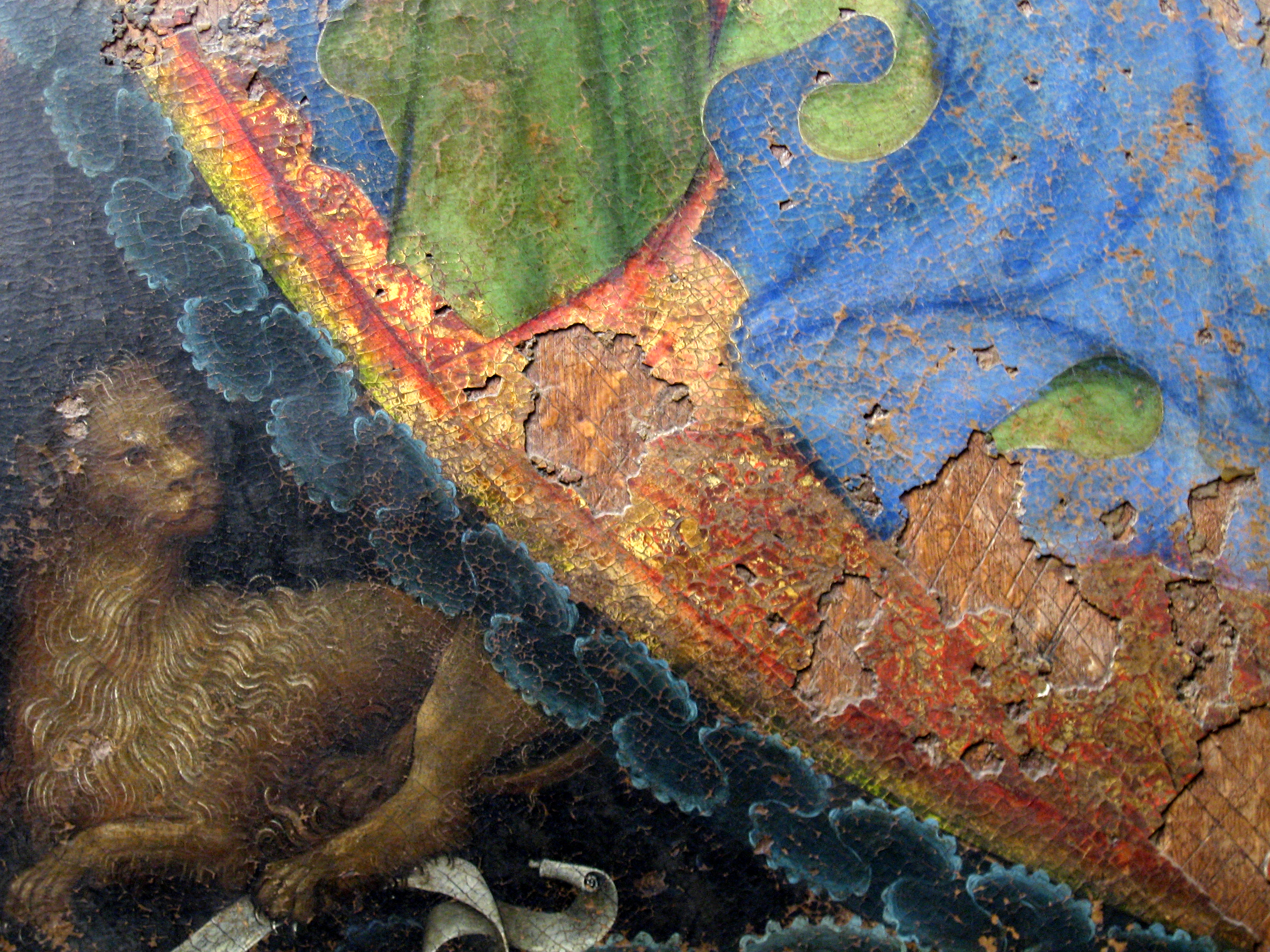 südliches Seitenschiff, gotische Sandsteinmadonna